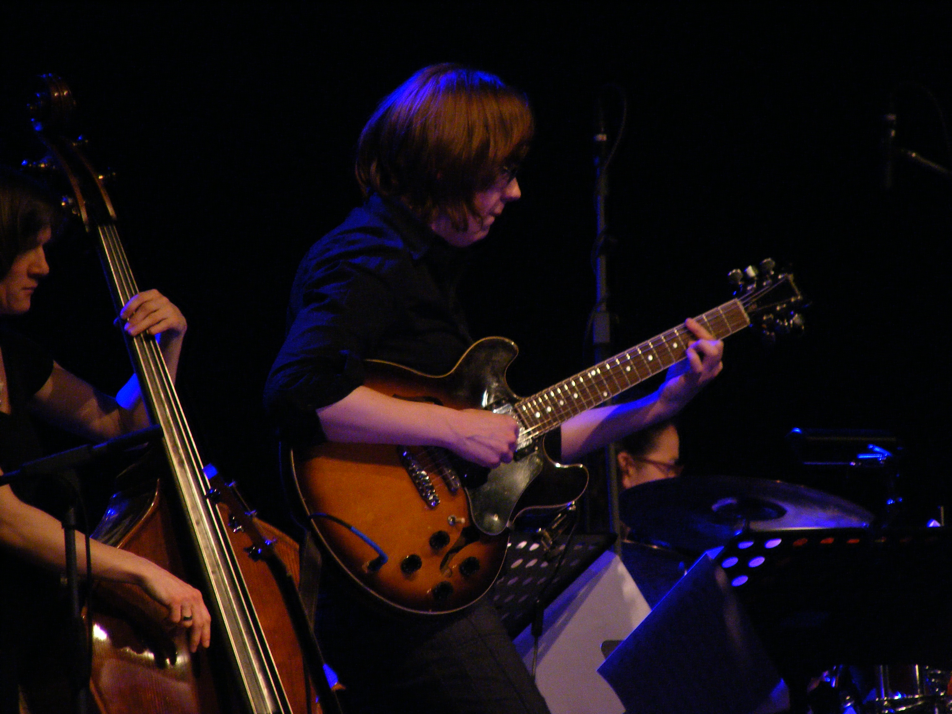 Sandra Hempel (Auftritt beim Jazzfestival St. Ingbert in der Formation "Nils Landgren - Respect" am 27.03.2009)